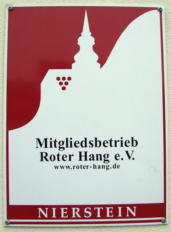 Mitgliedsbetrieb Roter Hang e.V., hier Schild am Weingut Gunderloch in Nackenheim